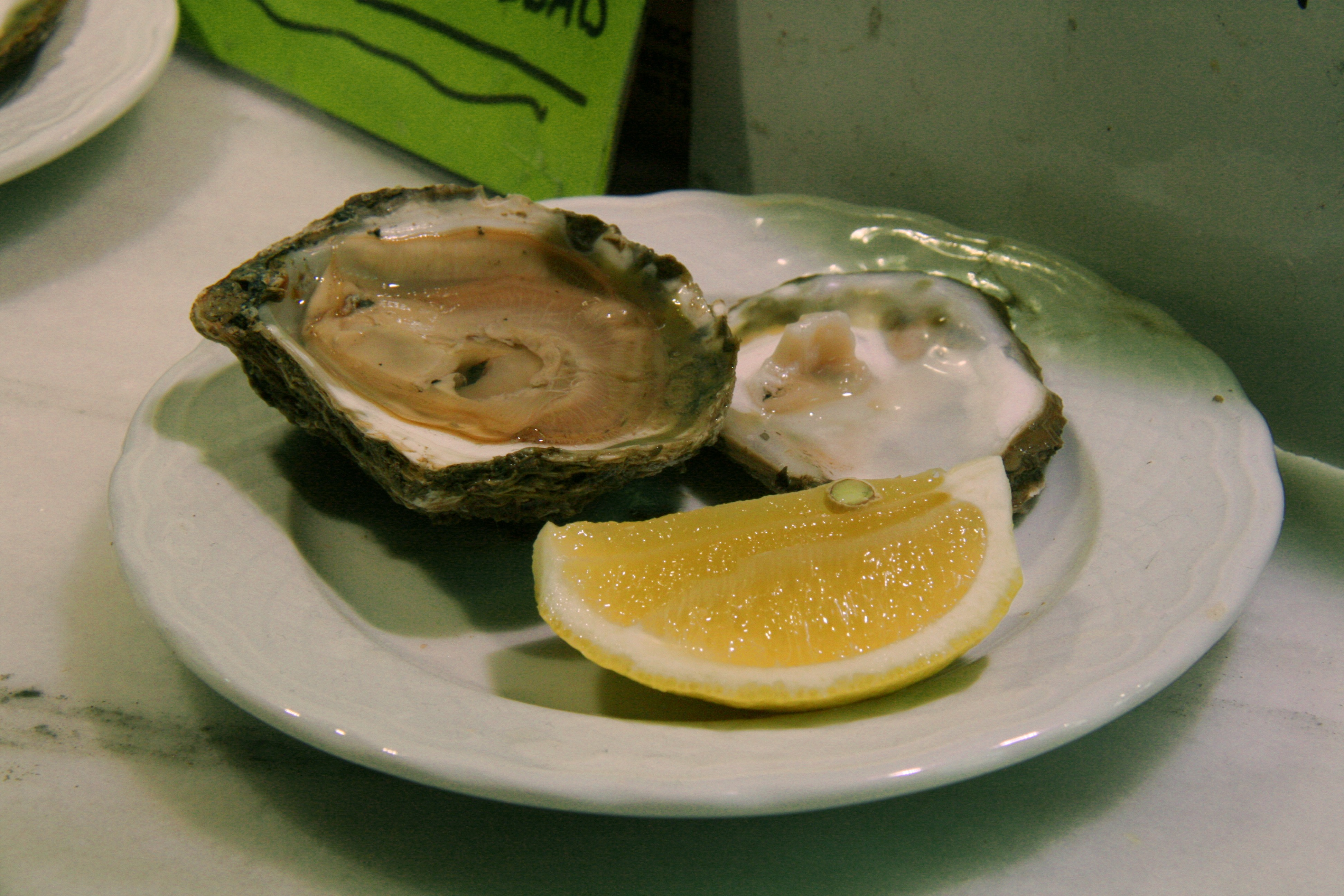 Ostras españolas